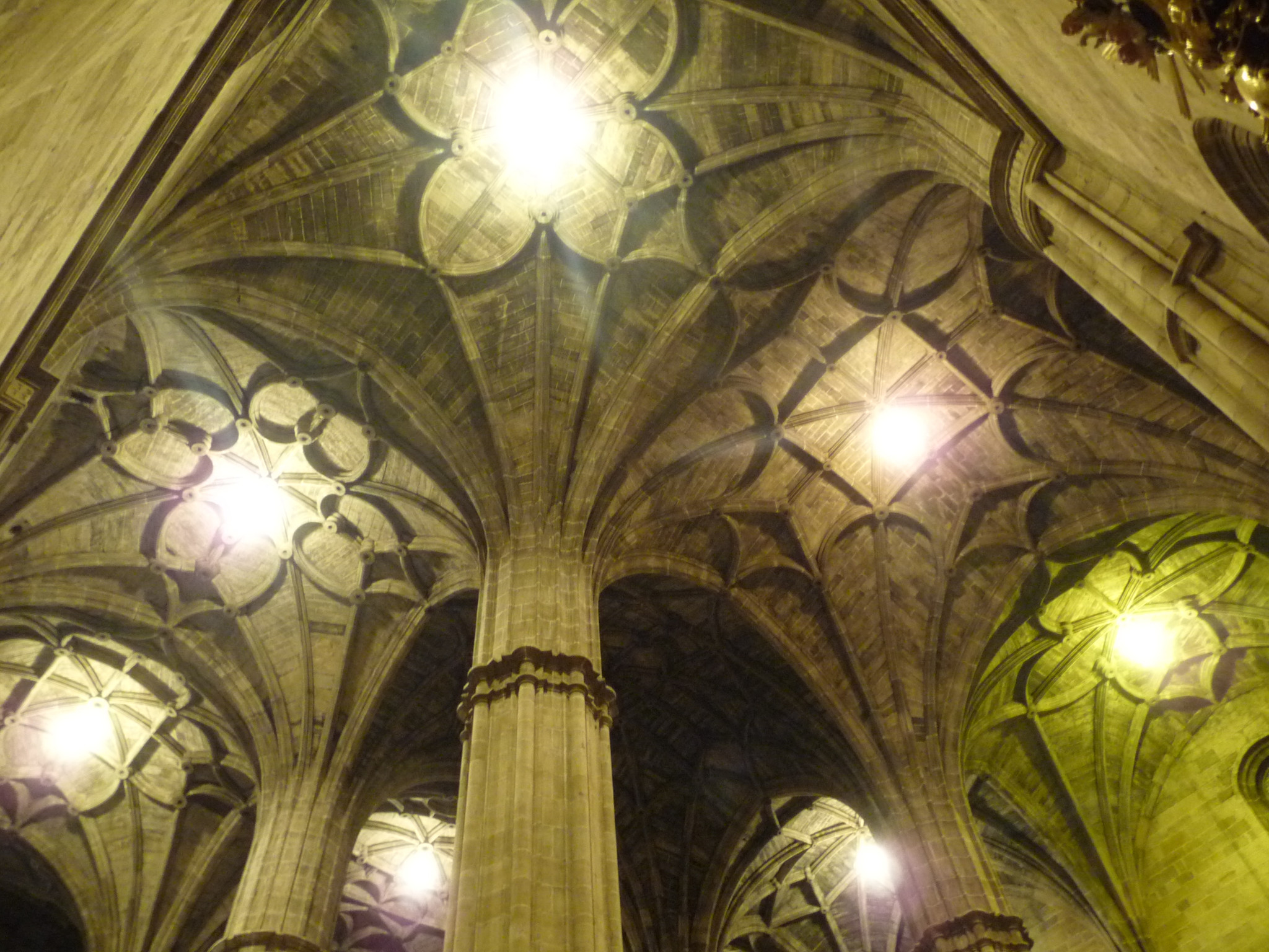 Iglesia de Santo Tomás. Haro, La Rioja (España) - Bóvedas de crucería.